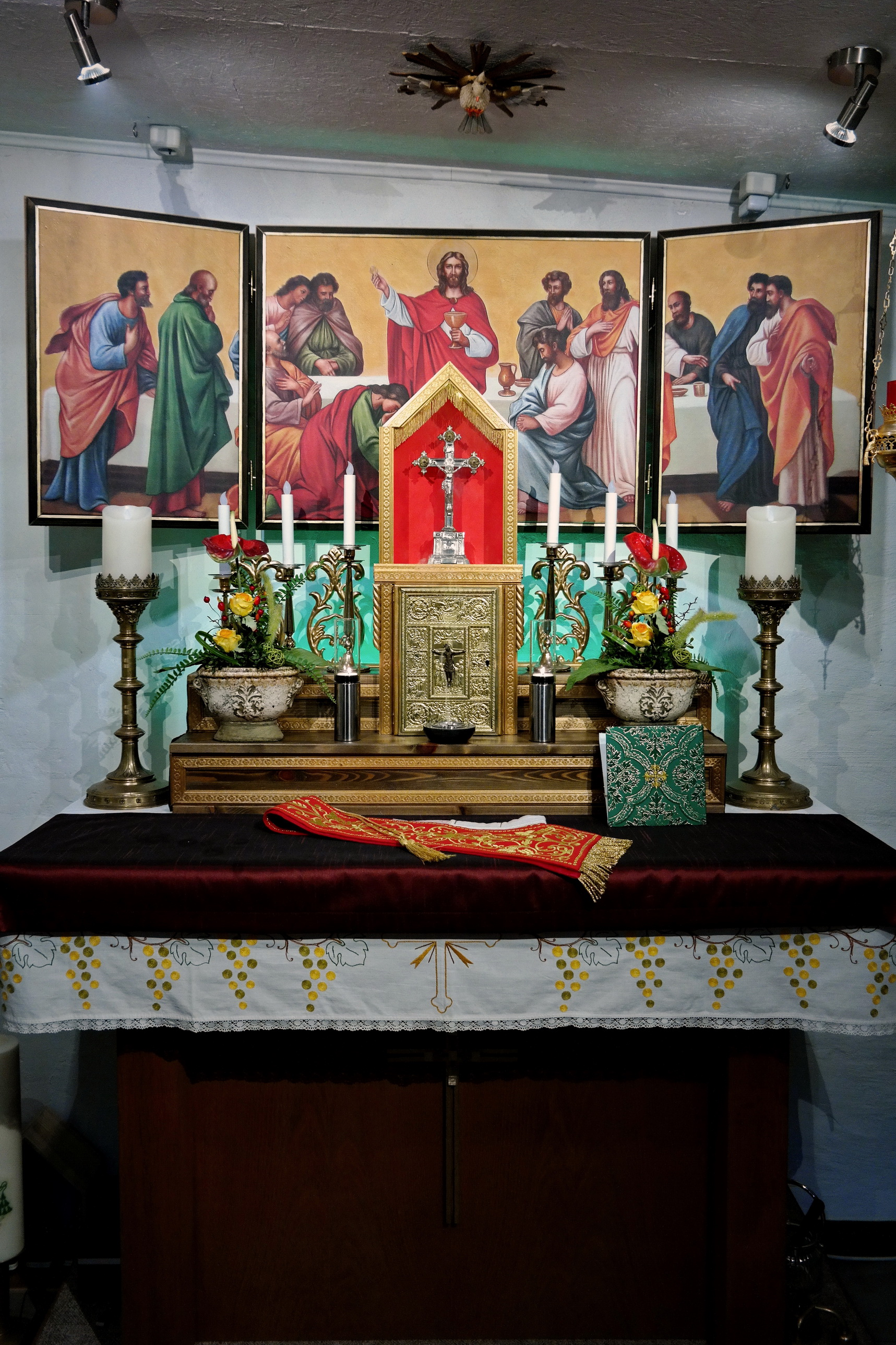 Ansicht aus der Kapelle der Unabhängig-katholischen Kirche in Hövelhof